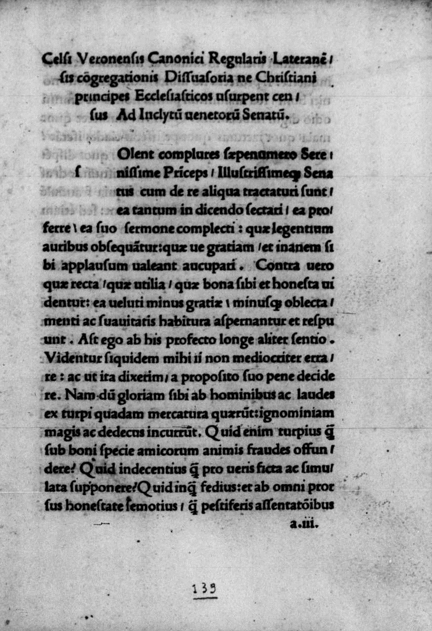 Carta a 2r